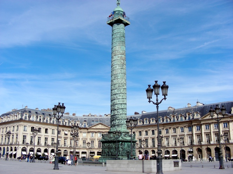 Place Vendôme, Paris